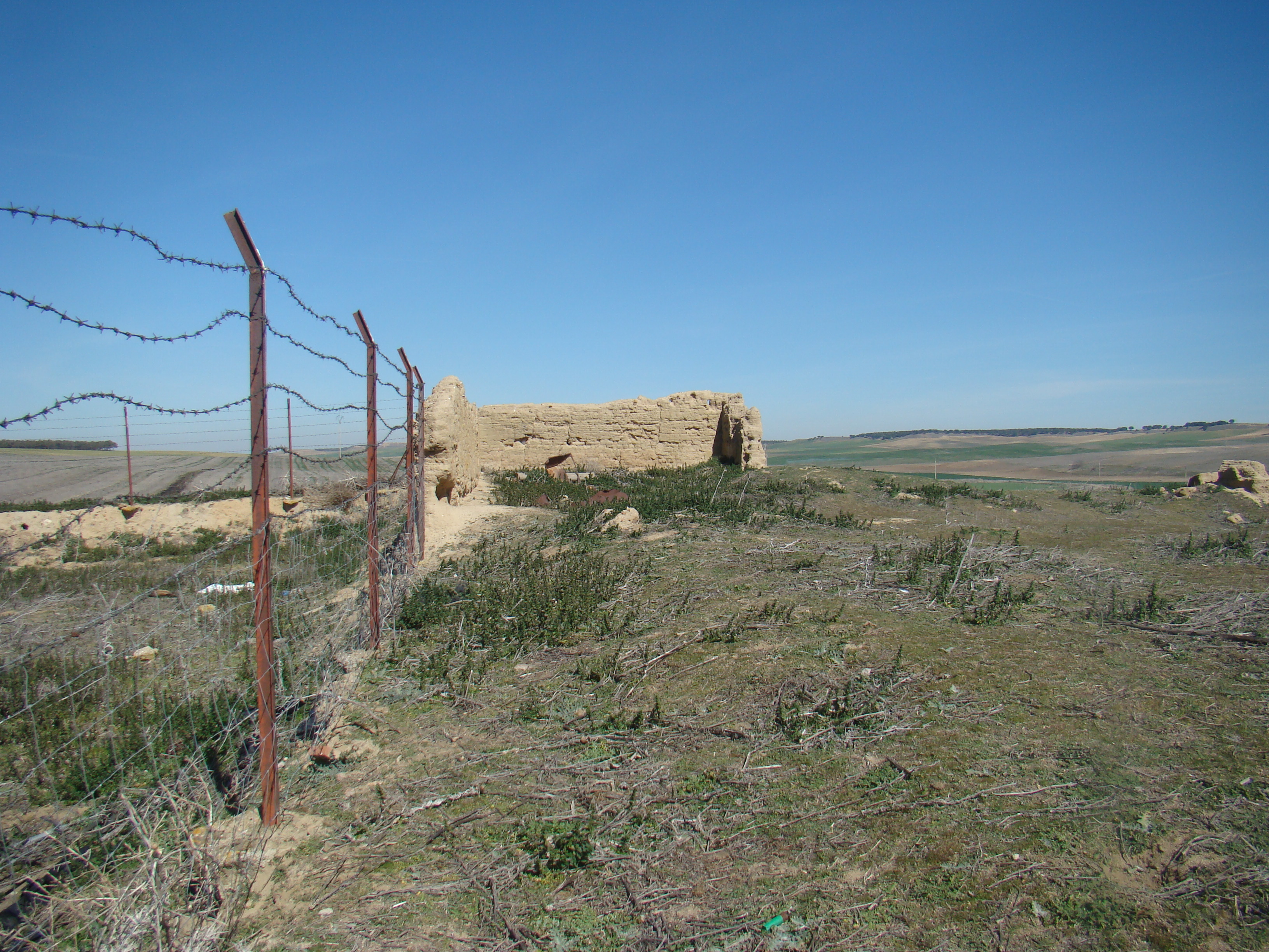 Carrioncillo, (provincia de Valladolid, España), un lugar despoblado, ubicado a orillas del río Zapardiel, que perteneció a la Tierra de Medina. Hubo un palacio en la Edad Media donde se crió y pasó sus años de mocedad el rey Alfonso V de Aragón. En el siglo XXI sólo queda en pie la ermita recientemente restaurada.